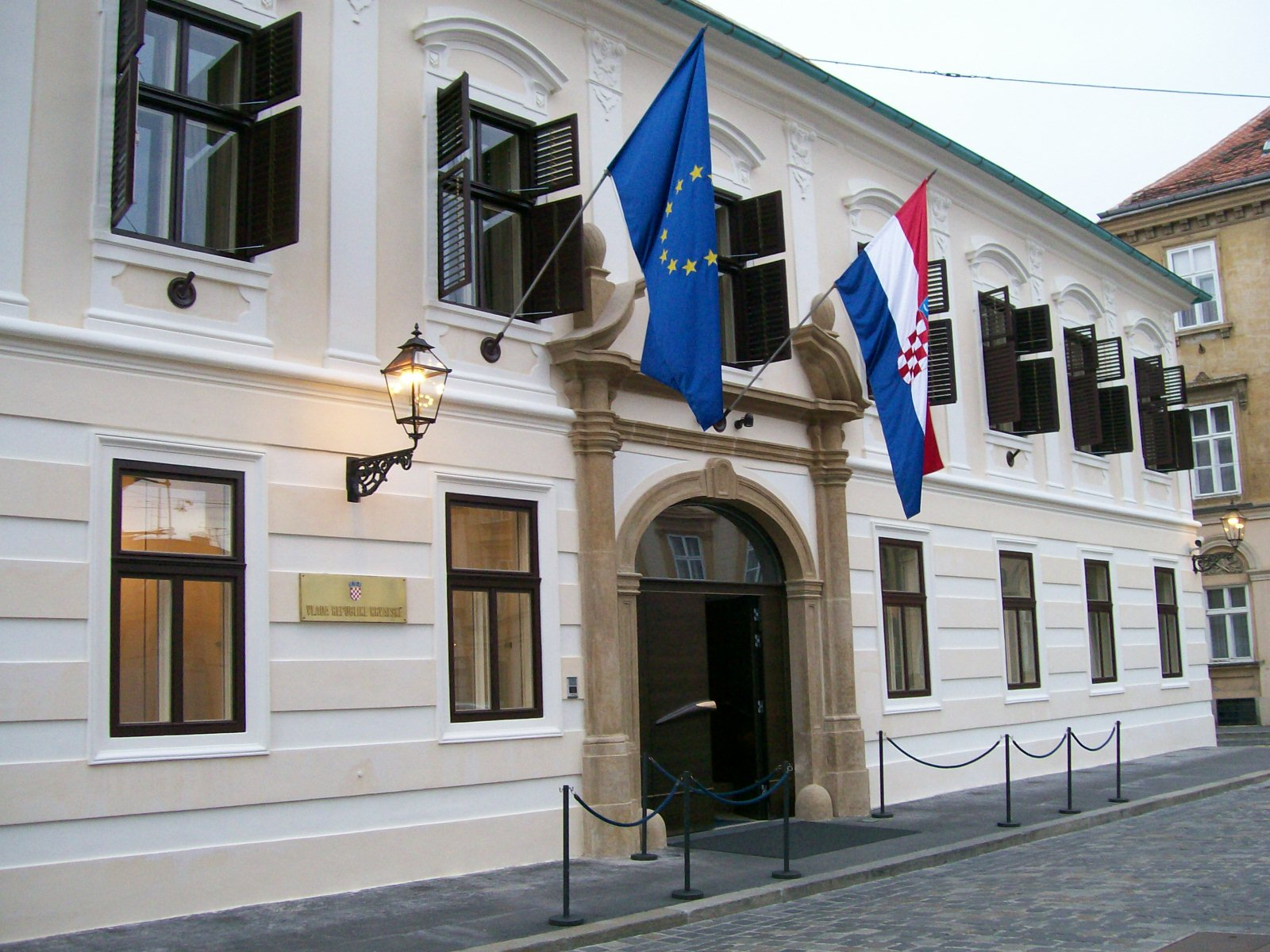 Vlada Republike Hrvatske